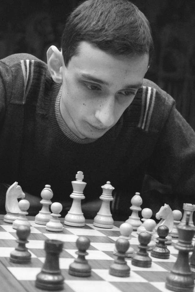 Роберт Оганесян